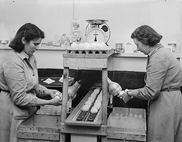 Teitl Cymraeg/Welsh title: Hufenfa Meirion, Rhydymain Ffotograffydd/Photographer: Geoff Charles (1909-2002) Nodyn/Note: Image shows workers grading eggs. Dyddiad/Date: January 15, 1954 Cyfrwng/Medium: Negydd ffilm / Film negative Cyfeiriad/Reference: (gch05470) Rhif cofnod / Record no.: 3367602 Rhagor o wybodaeth am gasgliad Geoff Charles yn Llyfrgell Genedlaethol Cymru More information about the Geoff Charles Collection at the National Library of Wales